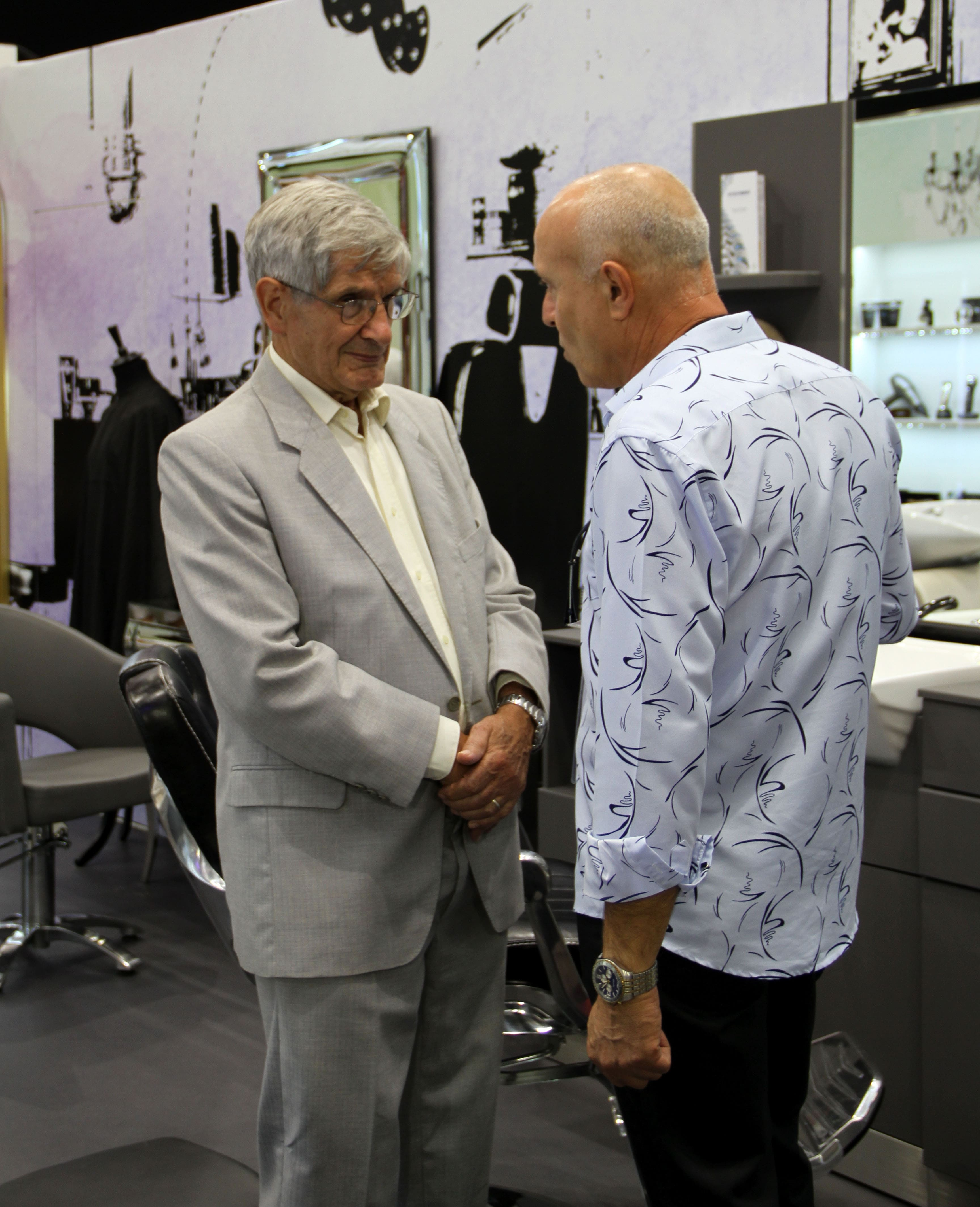 Jacques Seban au MCB 2019 ( avec le responsable du bureau d'étude)